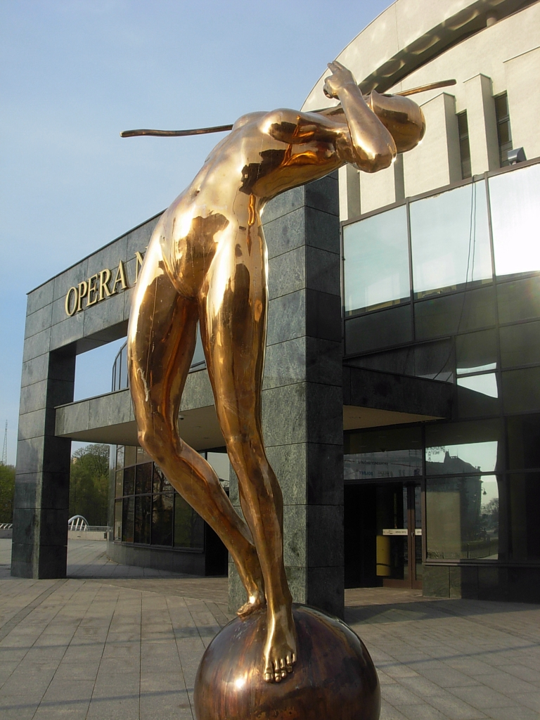 Rzeźba Łuczniczka Nova ustawiona przed Operą Nova w Bydgoszczy w 2013 roku